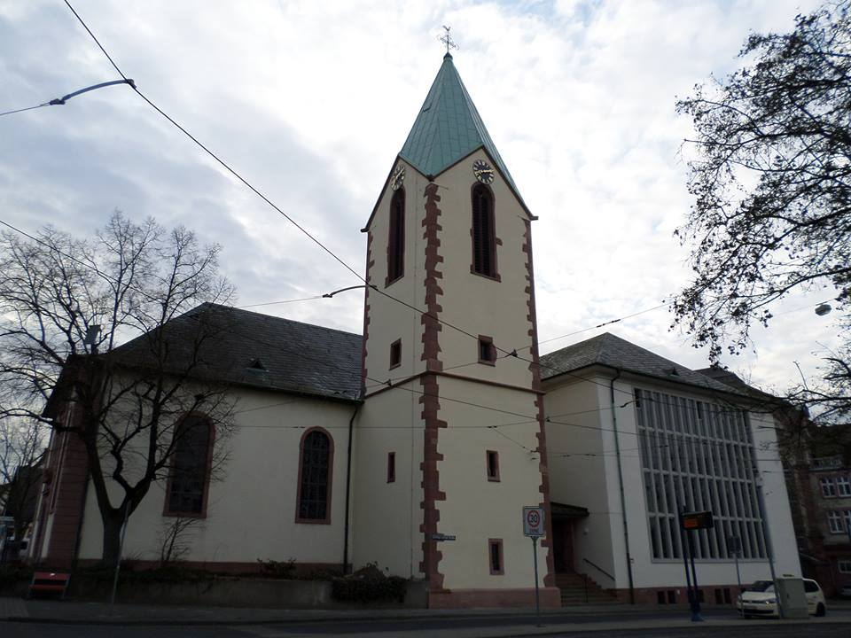 St. Peter und Paul Kirche Mannheim-Feudenheim nach der Turmsanierung im Jahr 2014